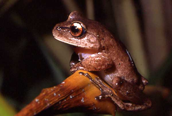 Aplastodiscus cochranae